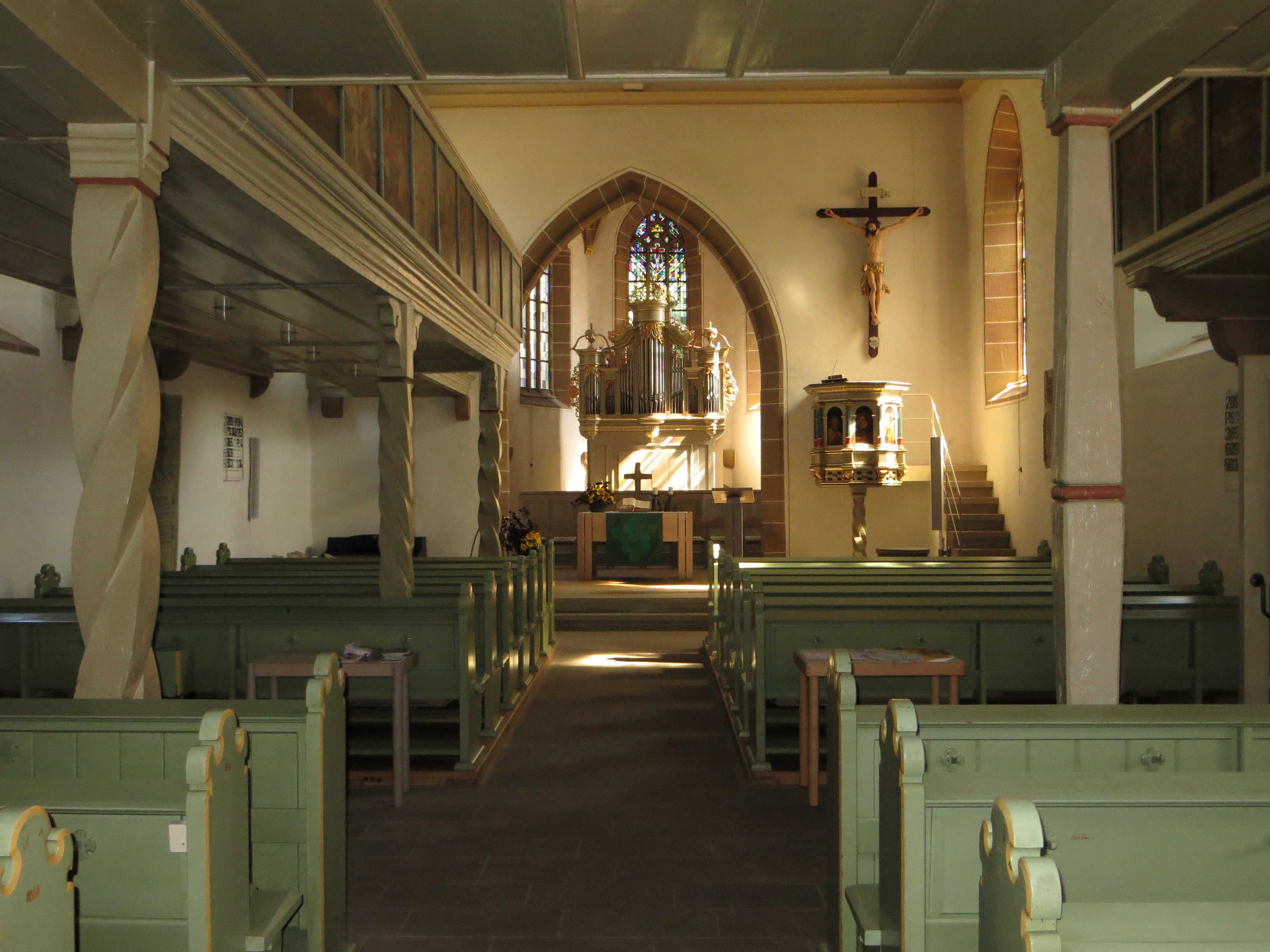 Die evangelische St.-Anna-Kirche in Beilstein. Innenraum, Blick zum Chor im Osten